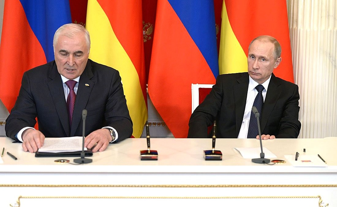 Подписание Договора между Российской Федерацией и Республикой Южная Осетия о союзничестве и интеграции.